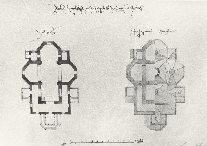 Беларуская (тарашкевіца): Віцебск (Viciebsk), Задзьвіньне (Zadźvińnie), вуліца Ільлінская (vulica Illinskaja). Царква Сьвятога Ільлі